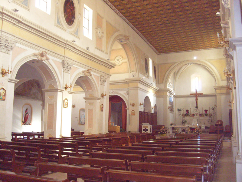 Cattedrale della Santissima Annunziata (Tursi) - Interno